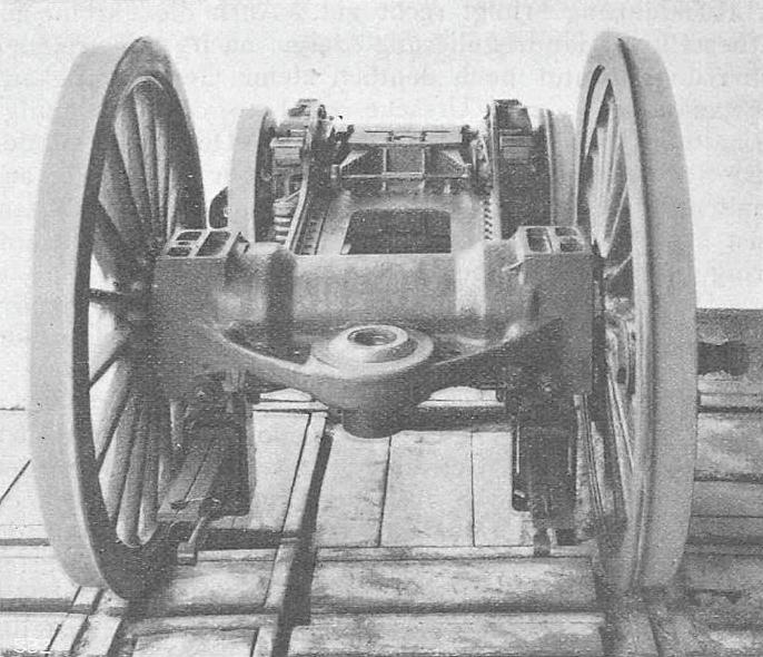 Java-Drehgestell der Schweizerischen Lokomotiv- und Maschinenfabrik Winterthur